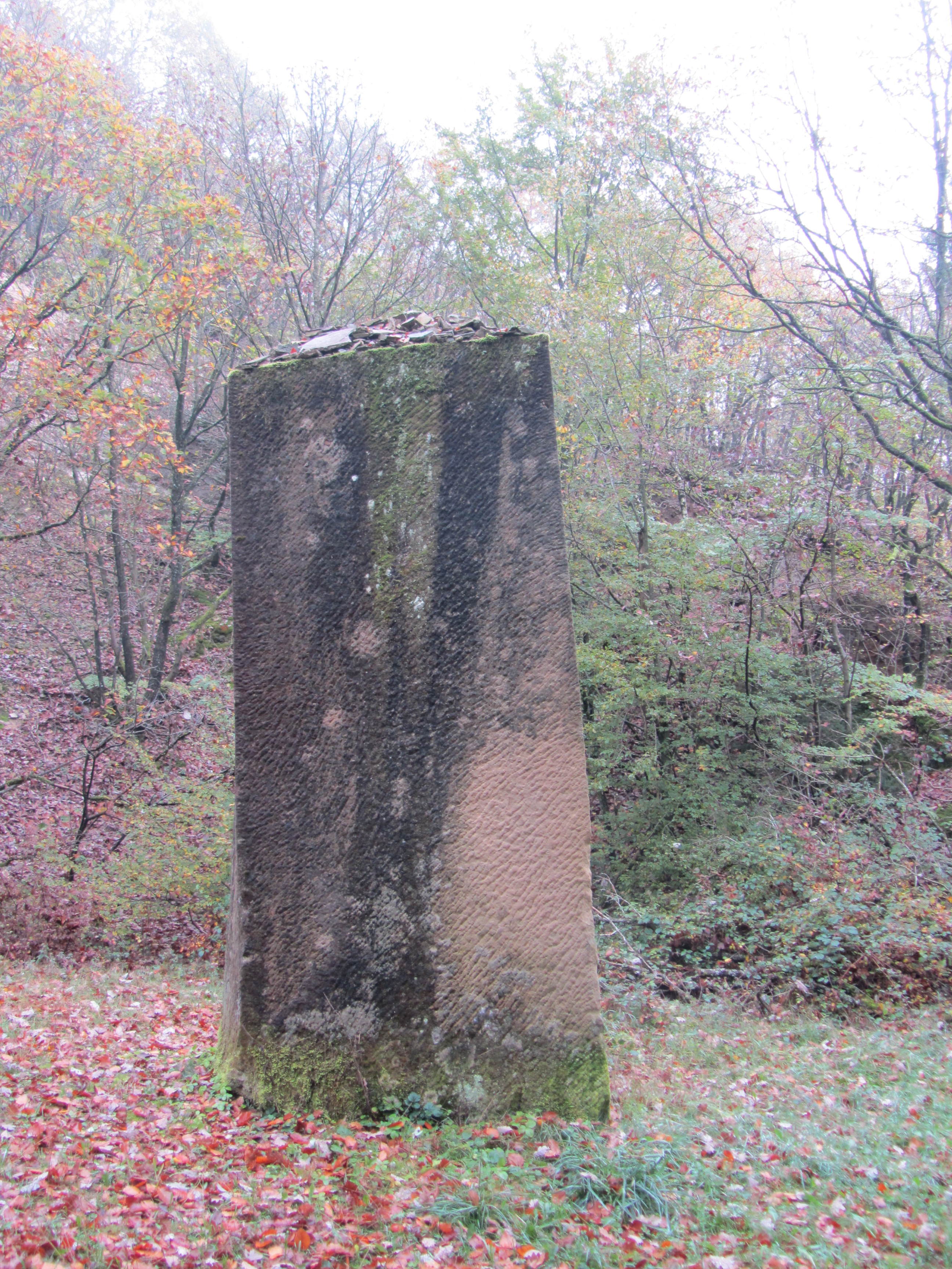 Christian Tobin: "Verkanteter" (1982), Straße der Skulpturen, St. Wendel (Standort: Wald nördlich von Oberthal (Saar)); gelber Sandstein, 380 x 140 x 110 cm